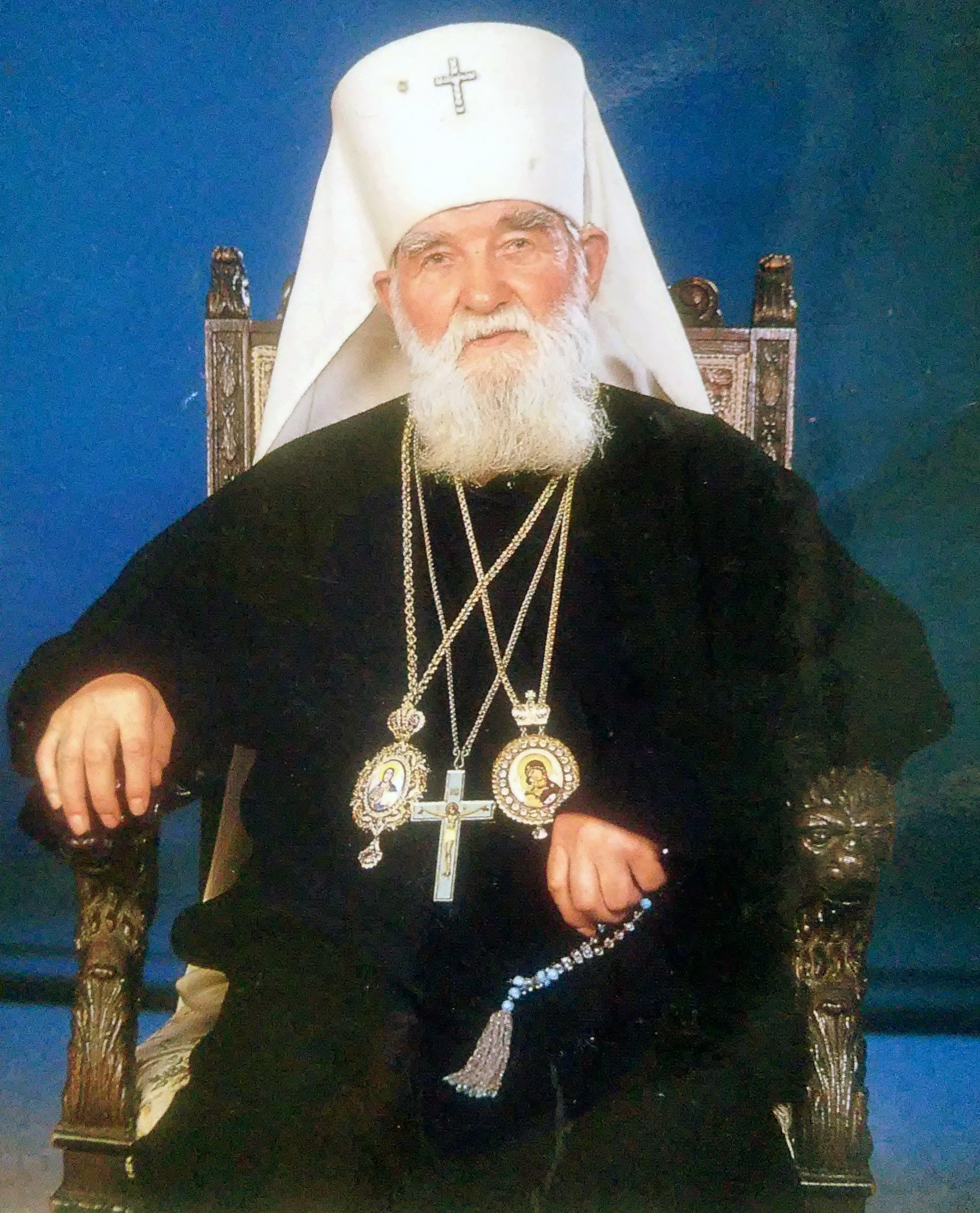 Vladyka Dorotej